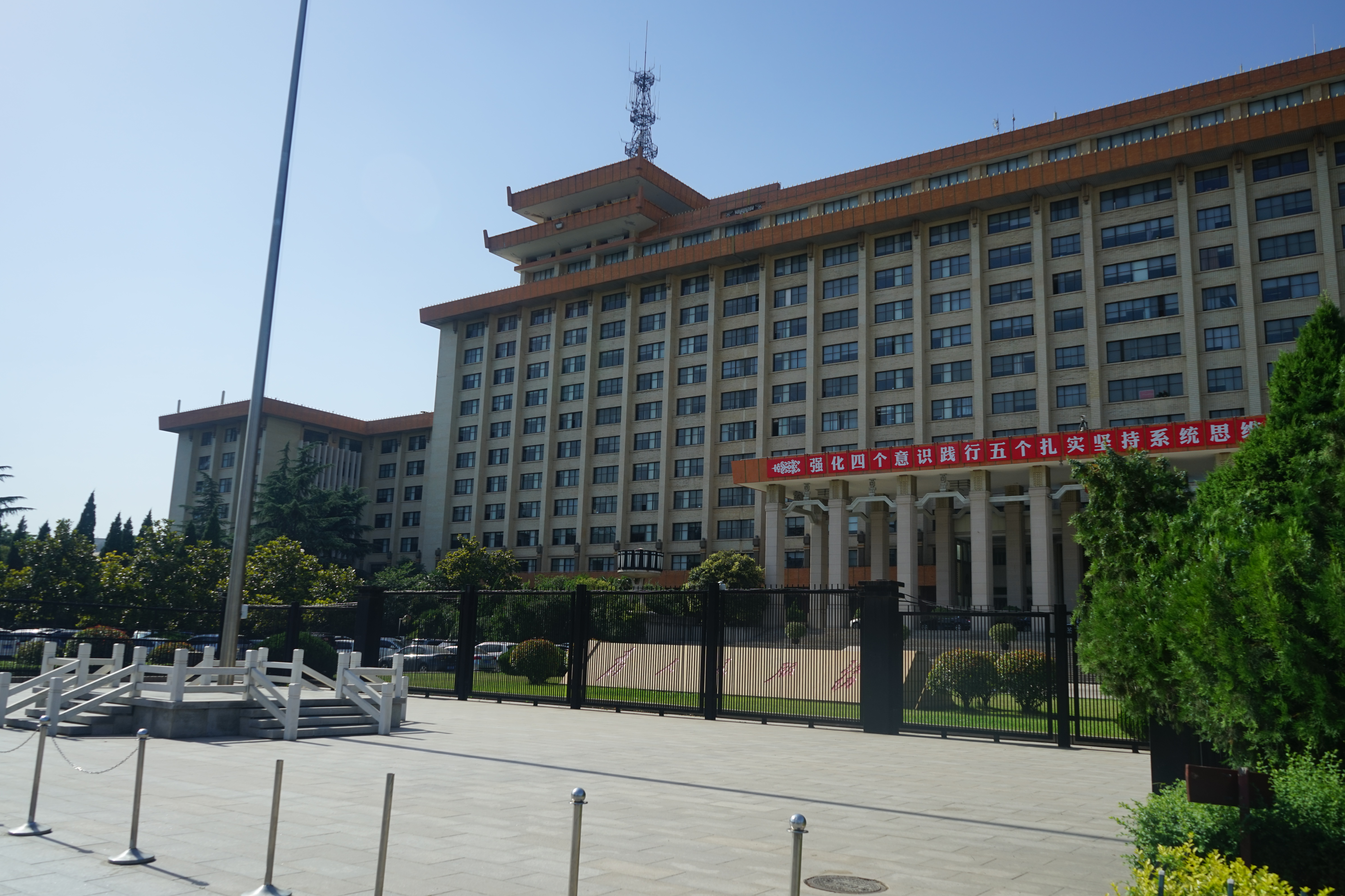 中文（中国大陆）: 陕西省人民政府大楼